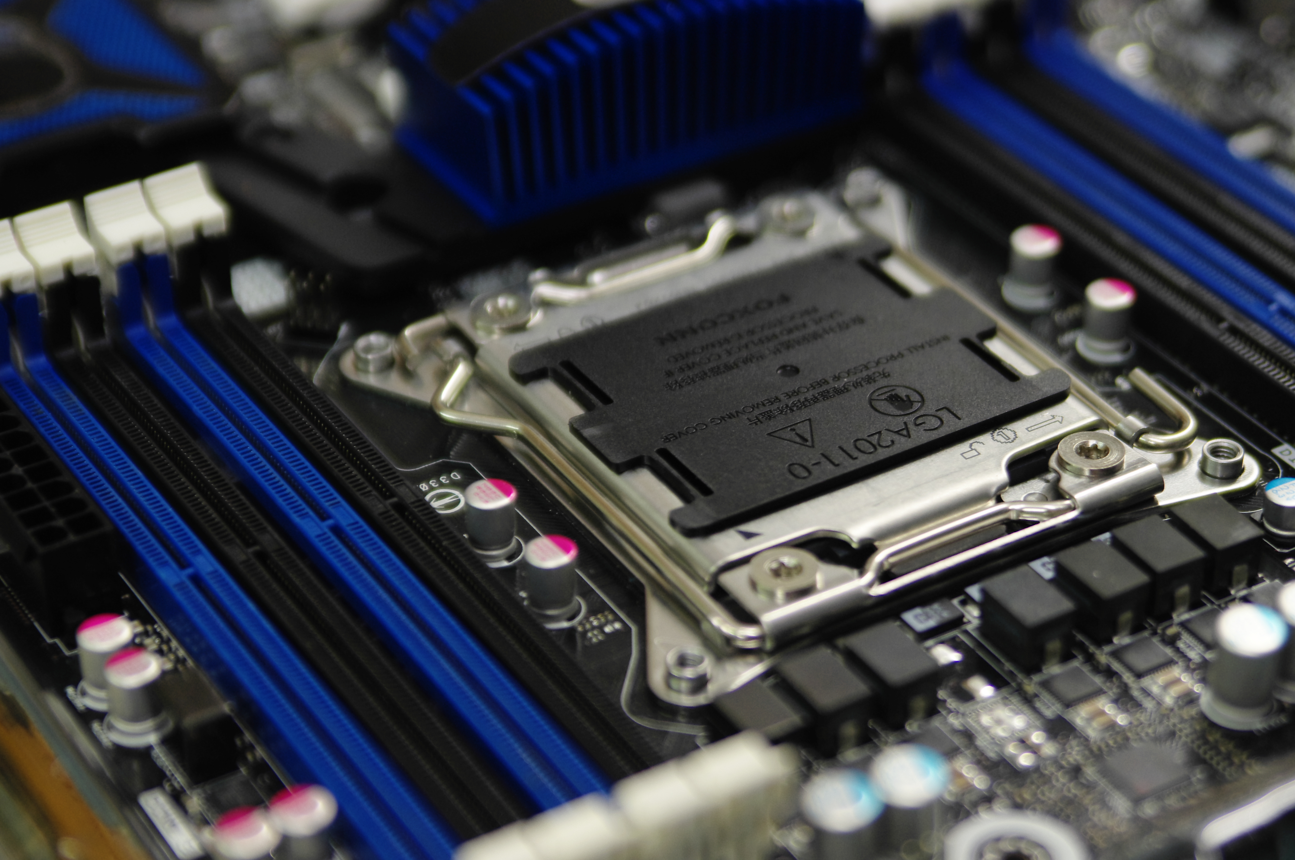 Intel Socket LGA 2011